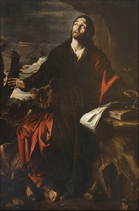 La obra representa a San Juan Evangelista en la isla de Patmos.